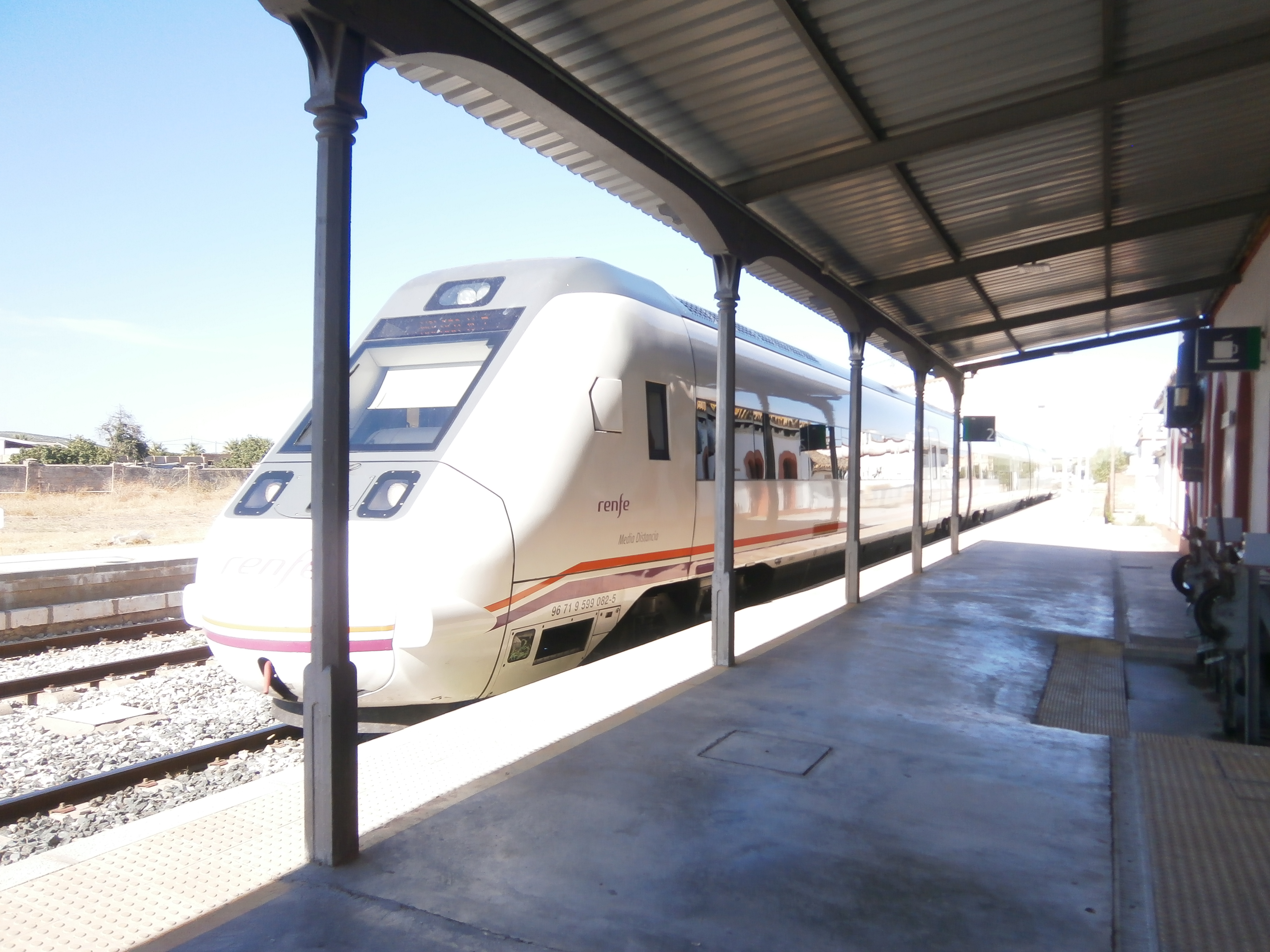 MD 599 en Marchena